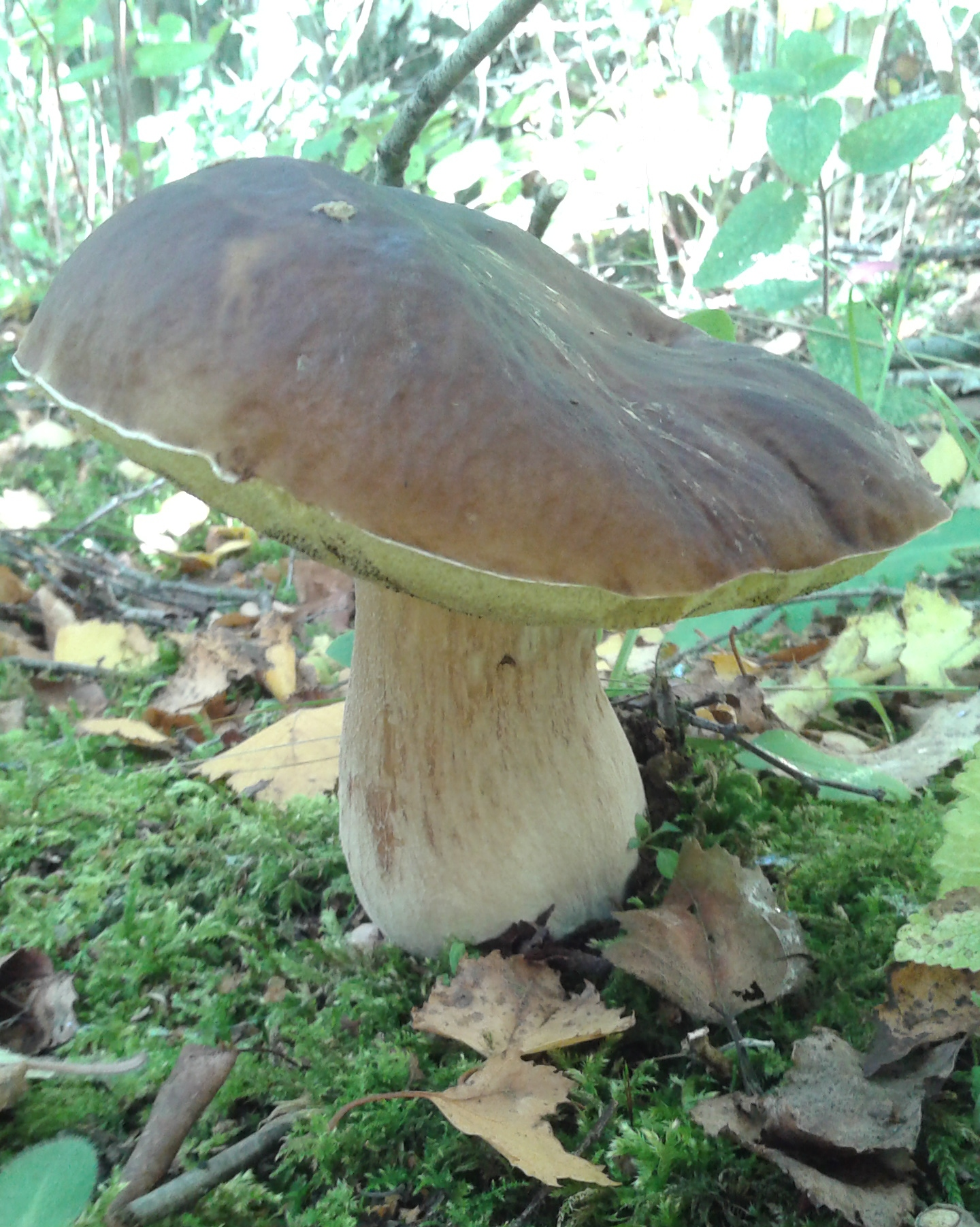 cèpe